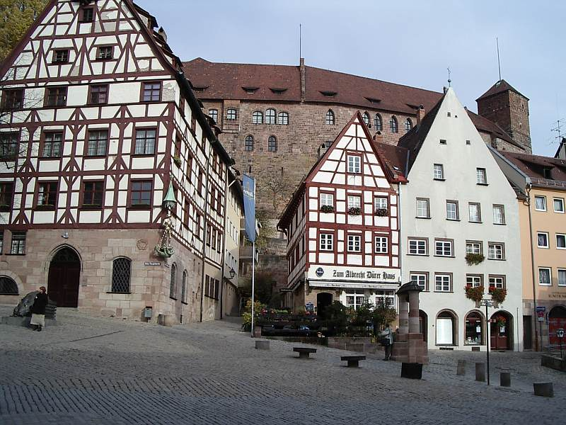 Nürnberg, Platz "Beim Tiergärtnertor", im Hintergrund die Burg, von SW (um 2003-11-07) / Unmittelbar an der westliche Stadtmauer.